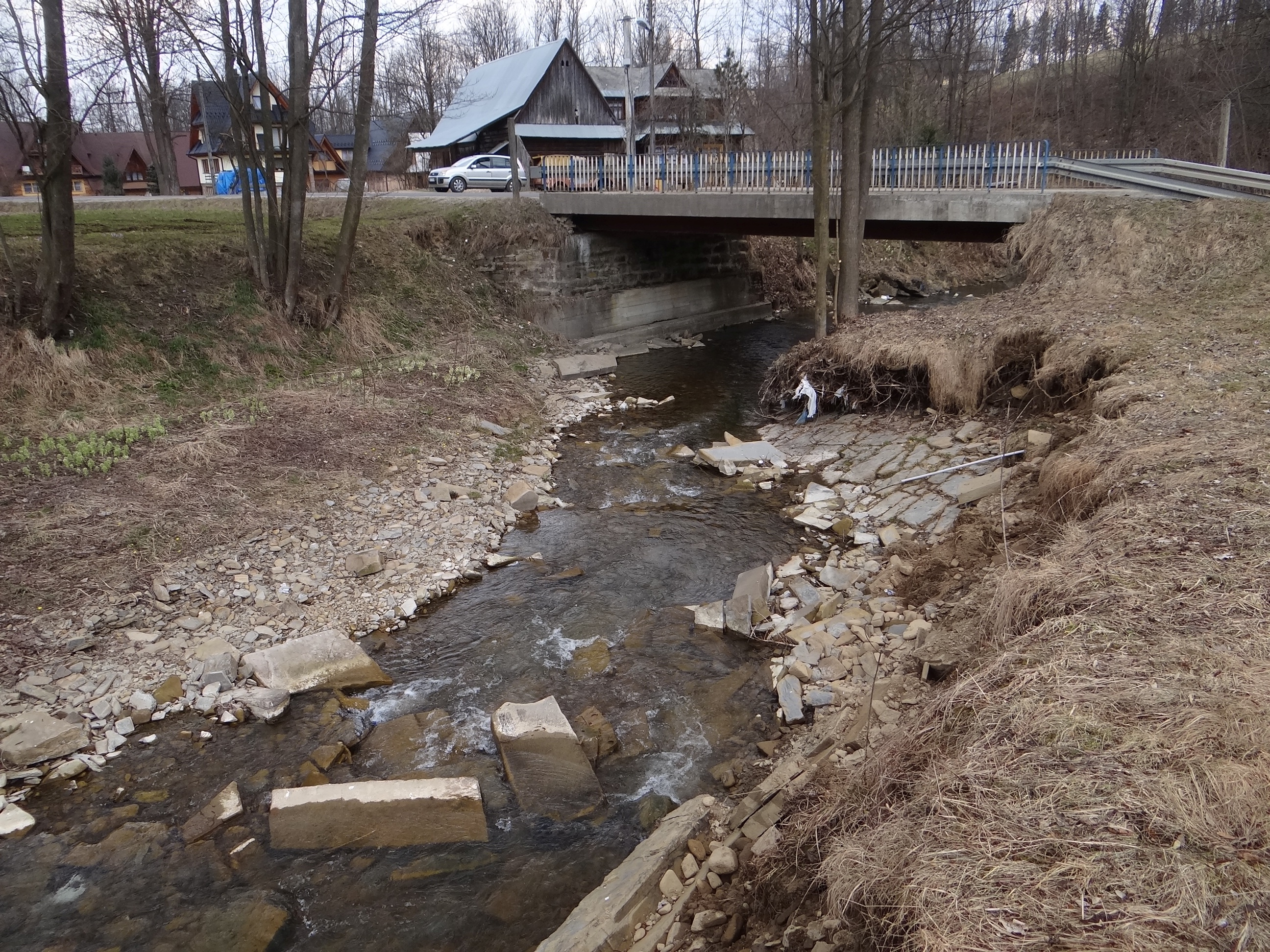 Bystry Potok